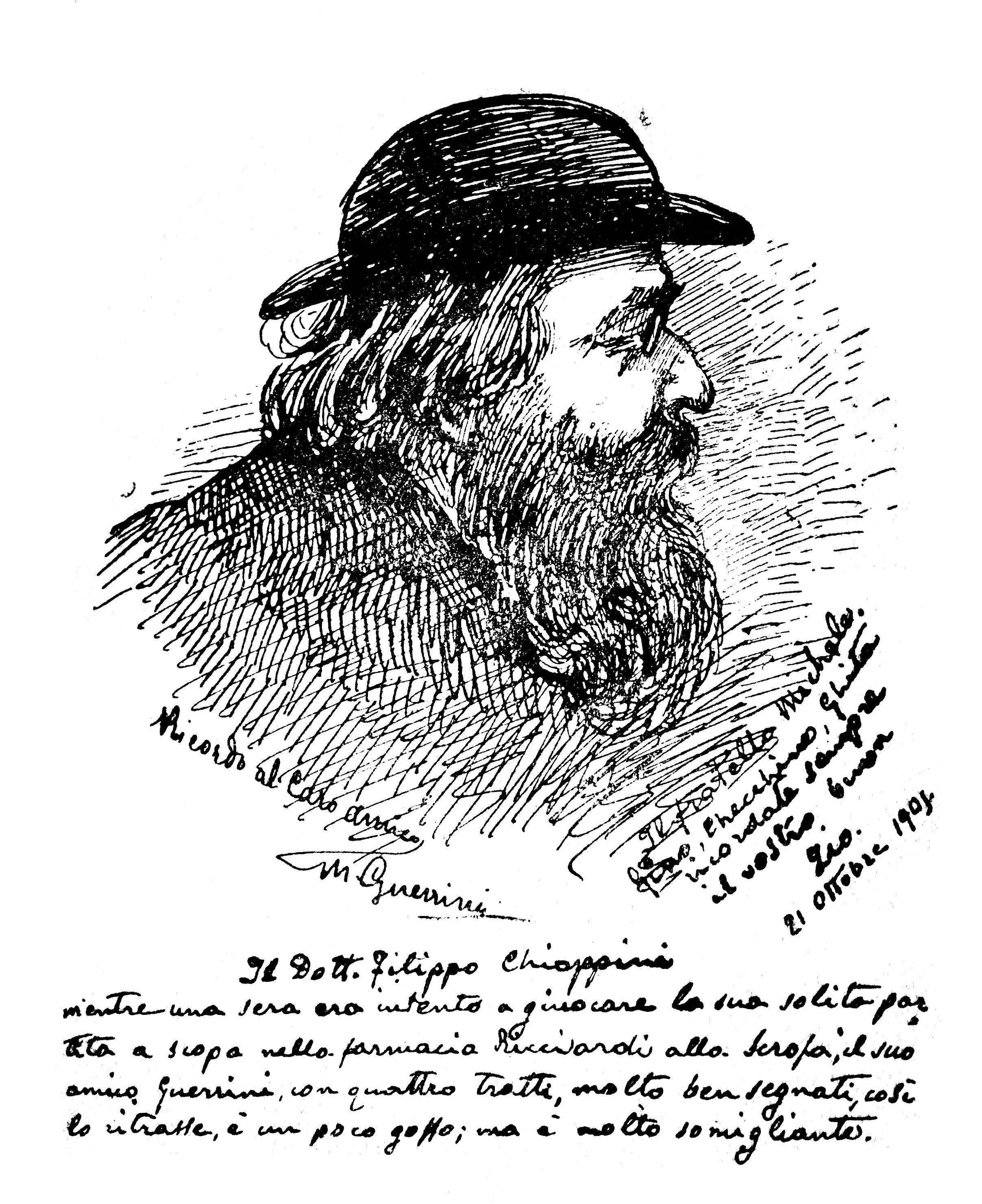 Ritratto del poeta dialettale Filippo Chiappini (1836-1905)